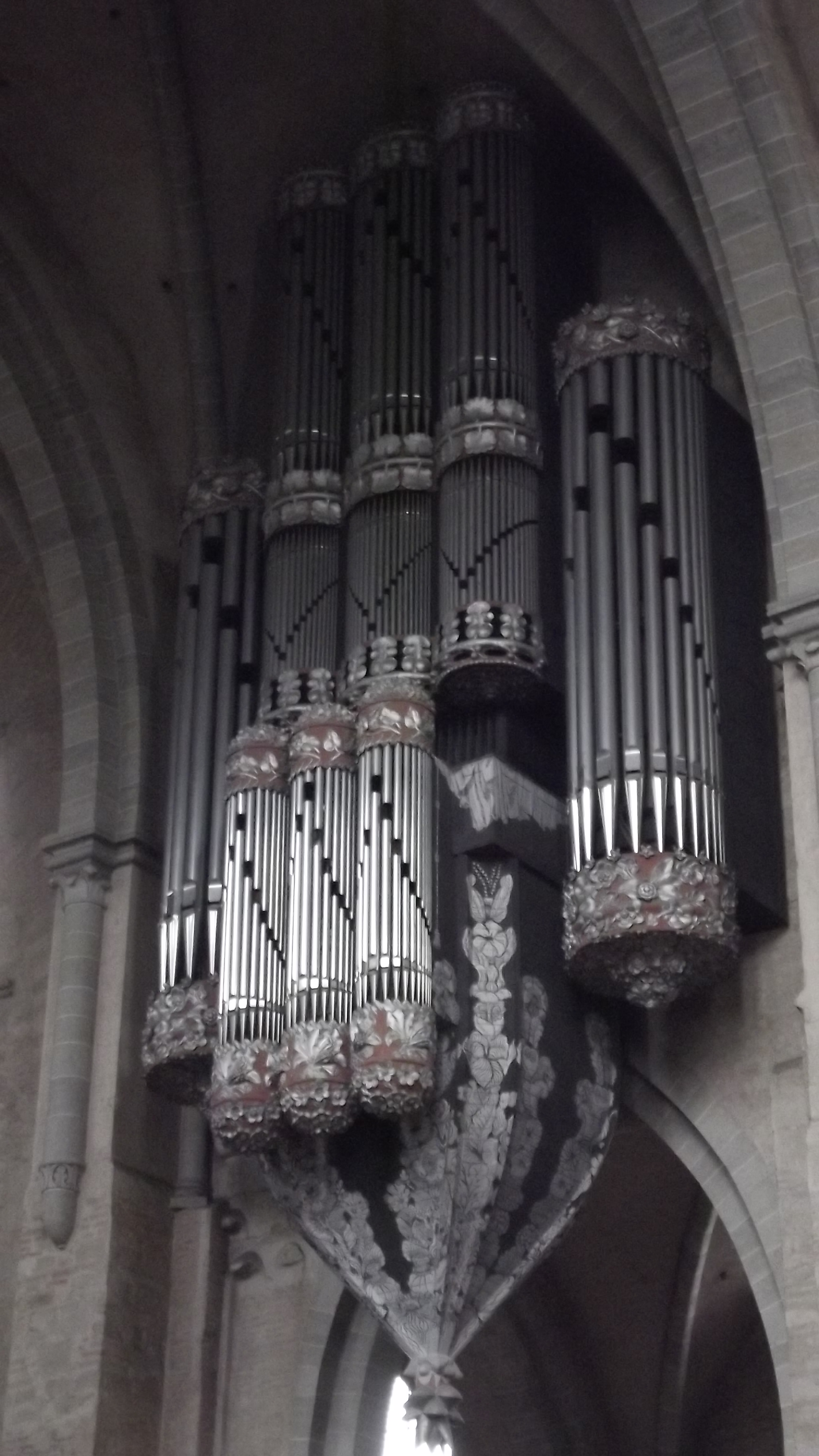 great organ of trierer dom